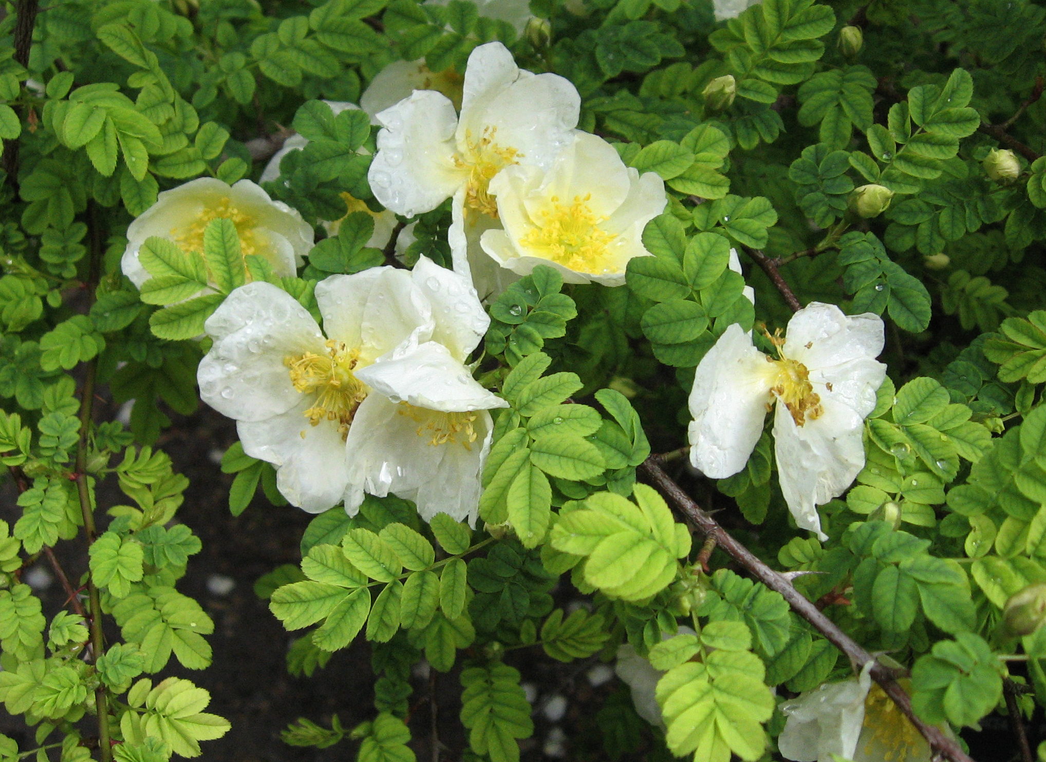 Rosa sericea var. pteracantha. Real Jardín Botánico de Madrid.